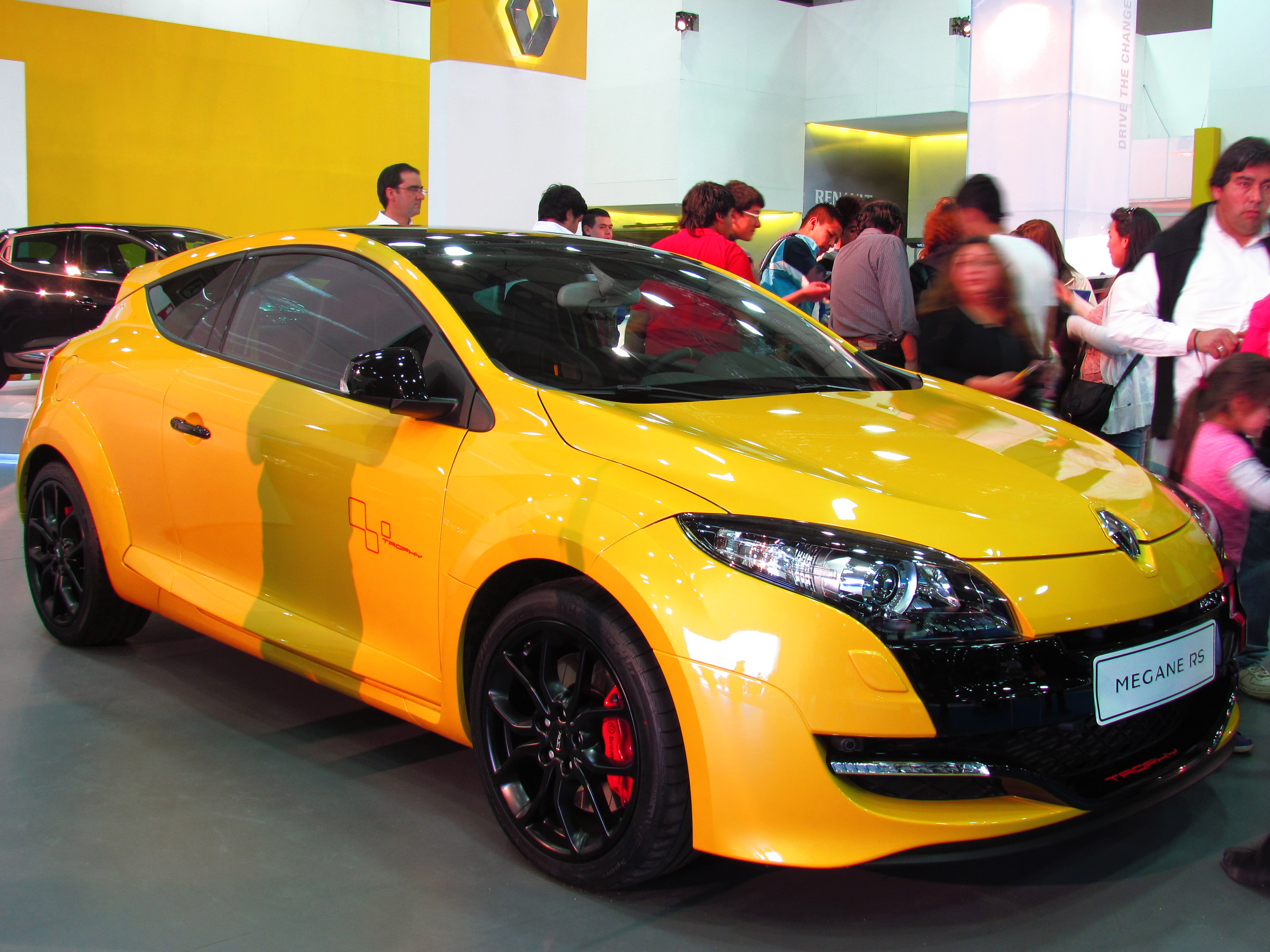 Renault Megane RS Trophy 2013